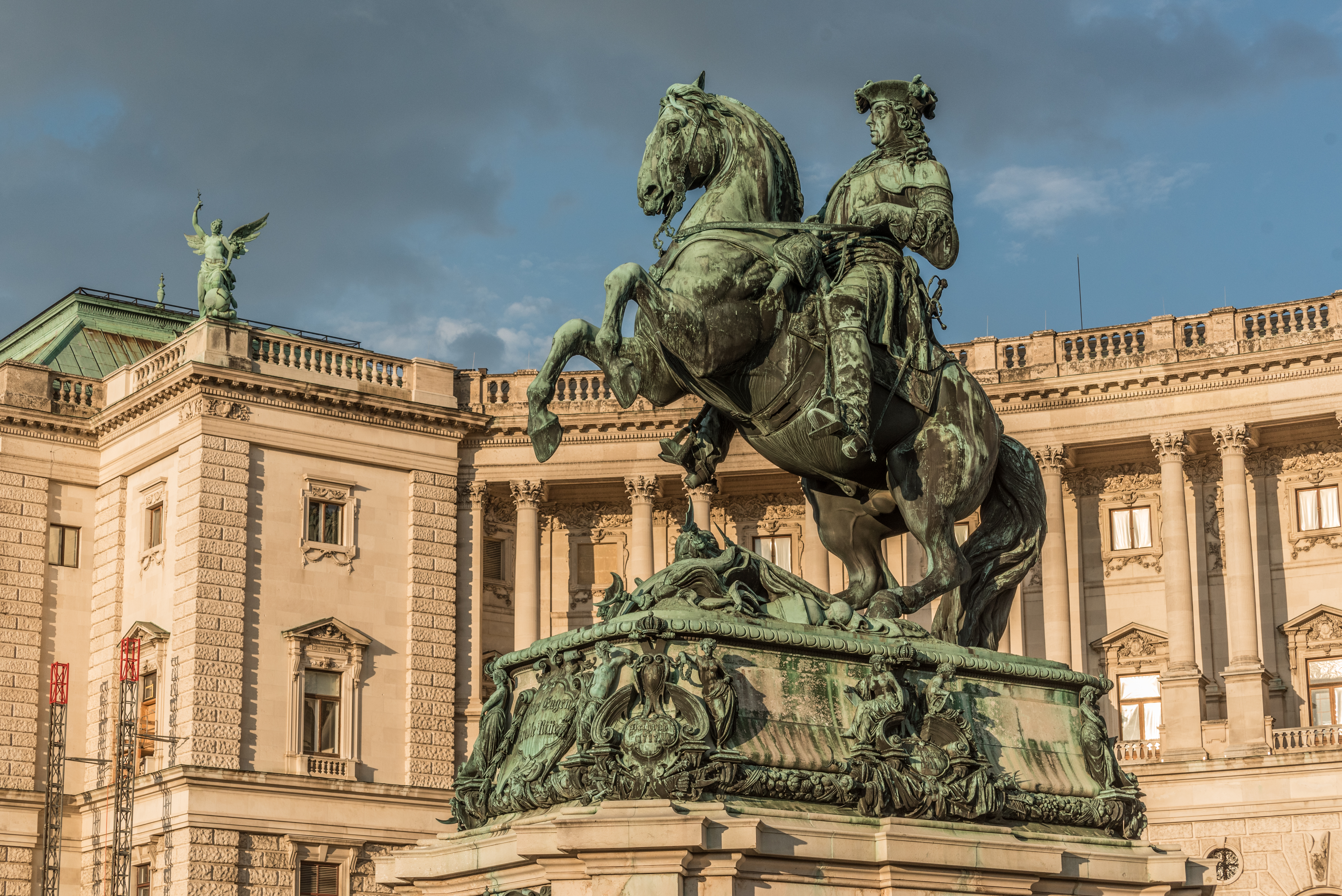 Wien,Heldenplatz, Prinz-Eugen-Denkmal, 20160621-009